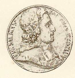 médaillon de l'abbé Jean-Baptiste-Augustin de Salignac